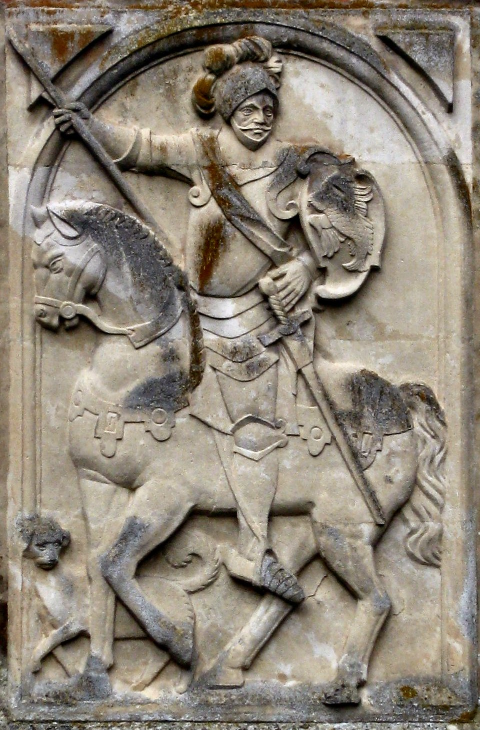 Relief an der Außenmauer von Burg Hülshoff, Havixbeck